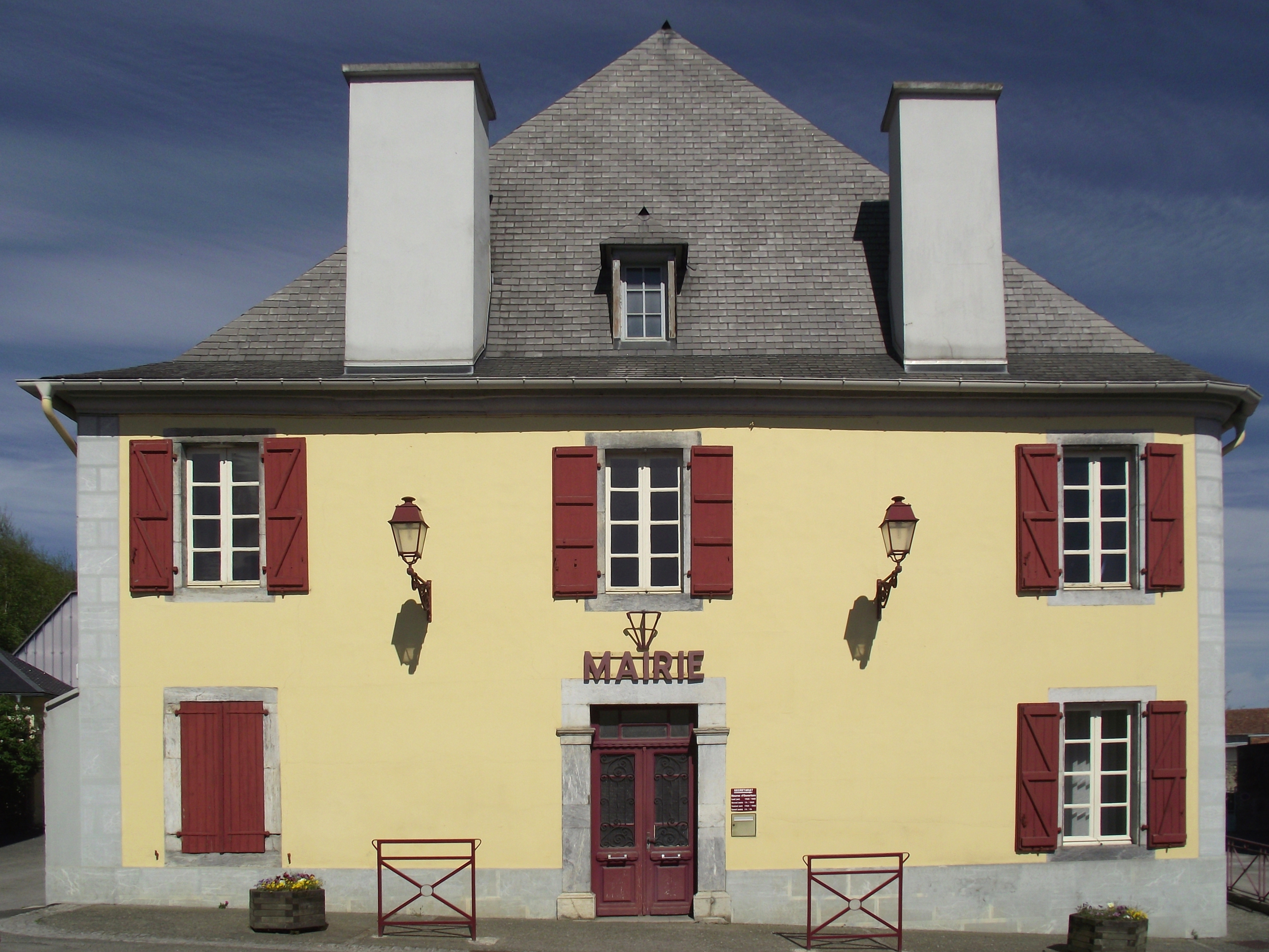 Mairie de Montgaillard (Hautes-Pyrénées, France)